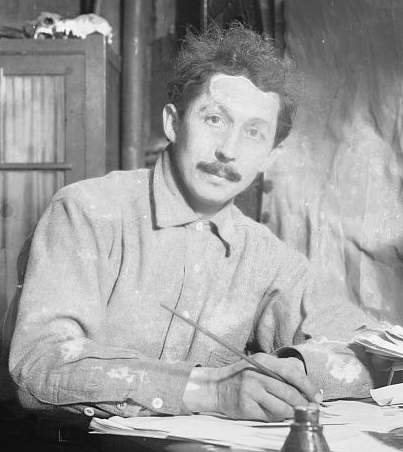 French explorer and painter Jacques Suzanne (1880-1967)